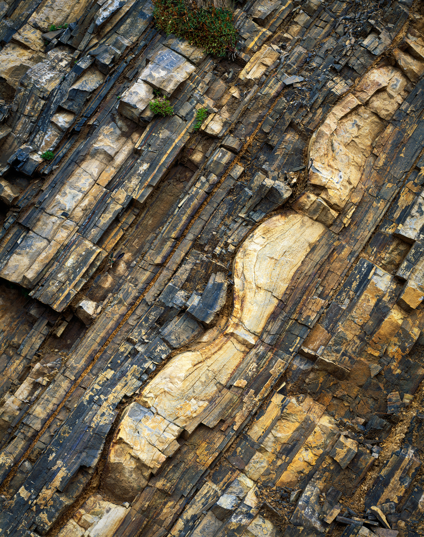 Formazione di Livinallongo, shot along the "Sentiero Geologico del Doss Capel" Fuji Velvia 50 8sec f/22 2/3 Fujinon 240mm F9 Scanner: Flextight X5